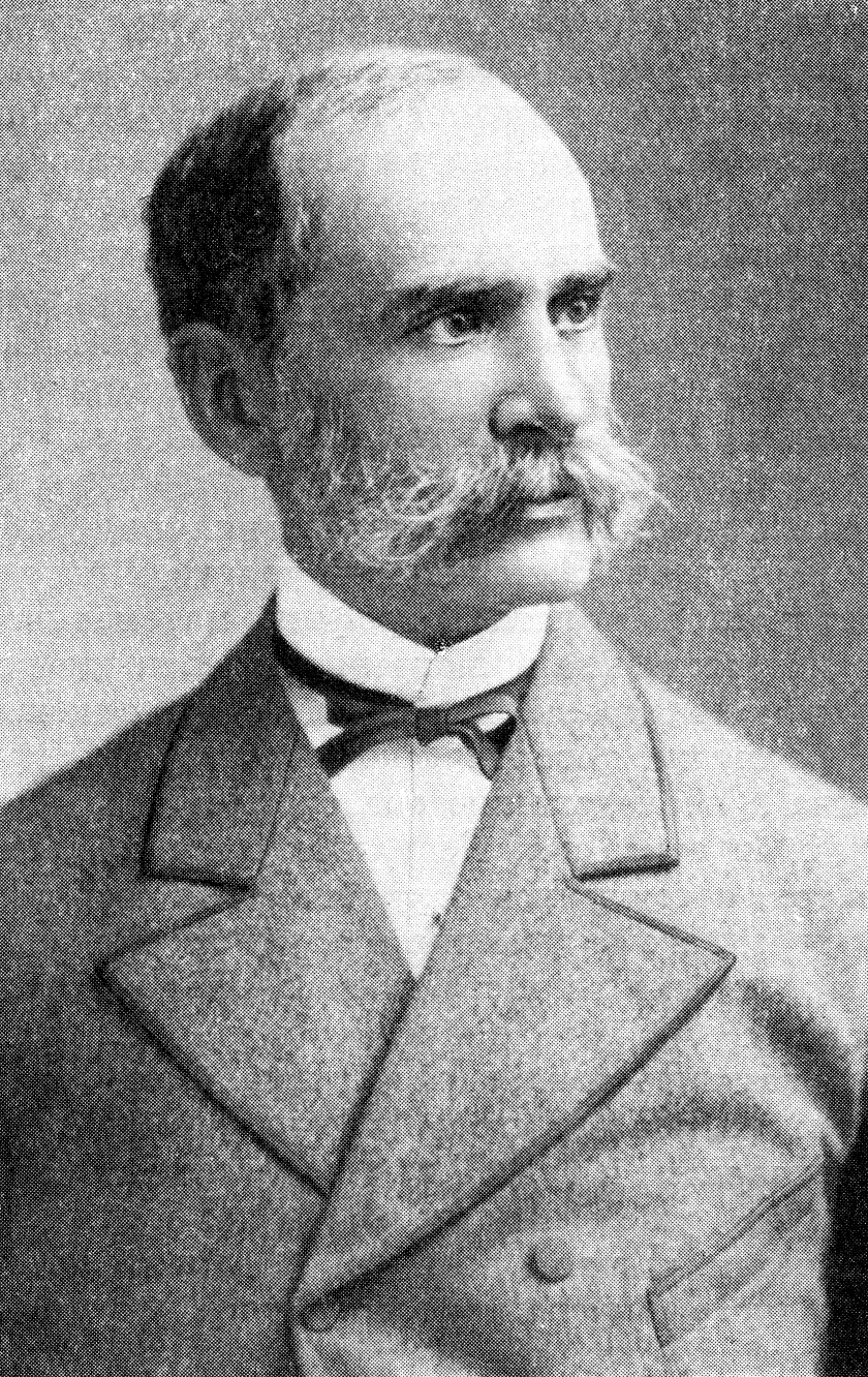 Аксель Вильгельмович Гадолин — кристаллограф, минералог, действительный член Петербургской АН.